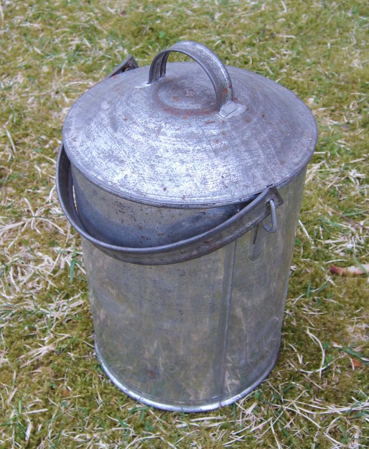 Handlaga blekkspann frå Nordmøre. Slike spanner, og dessutan handlaga vispar o.a., er typiske eksempel på handverket som medlemmer av romanifolket utførte i tidlegare tider. (Foto: Olve Utne)